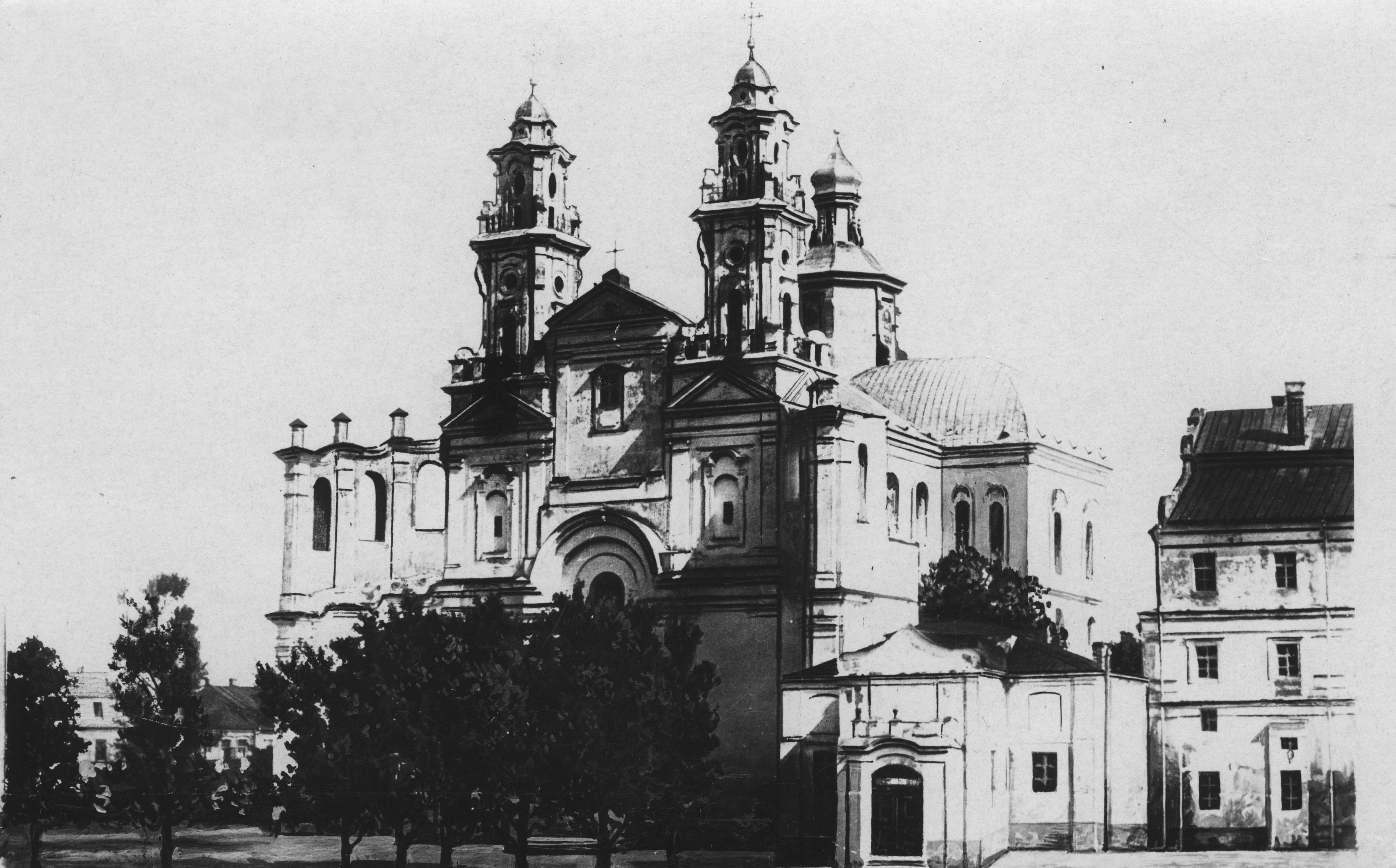 Беларуская (тарашкевіца): Пінск (Pinsk), пляц Рынак (plac Rynak). Касьцёл Сьвятога Станіслава і калегіюм езуітаў